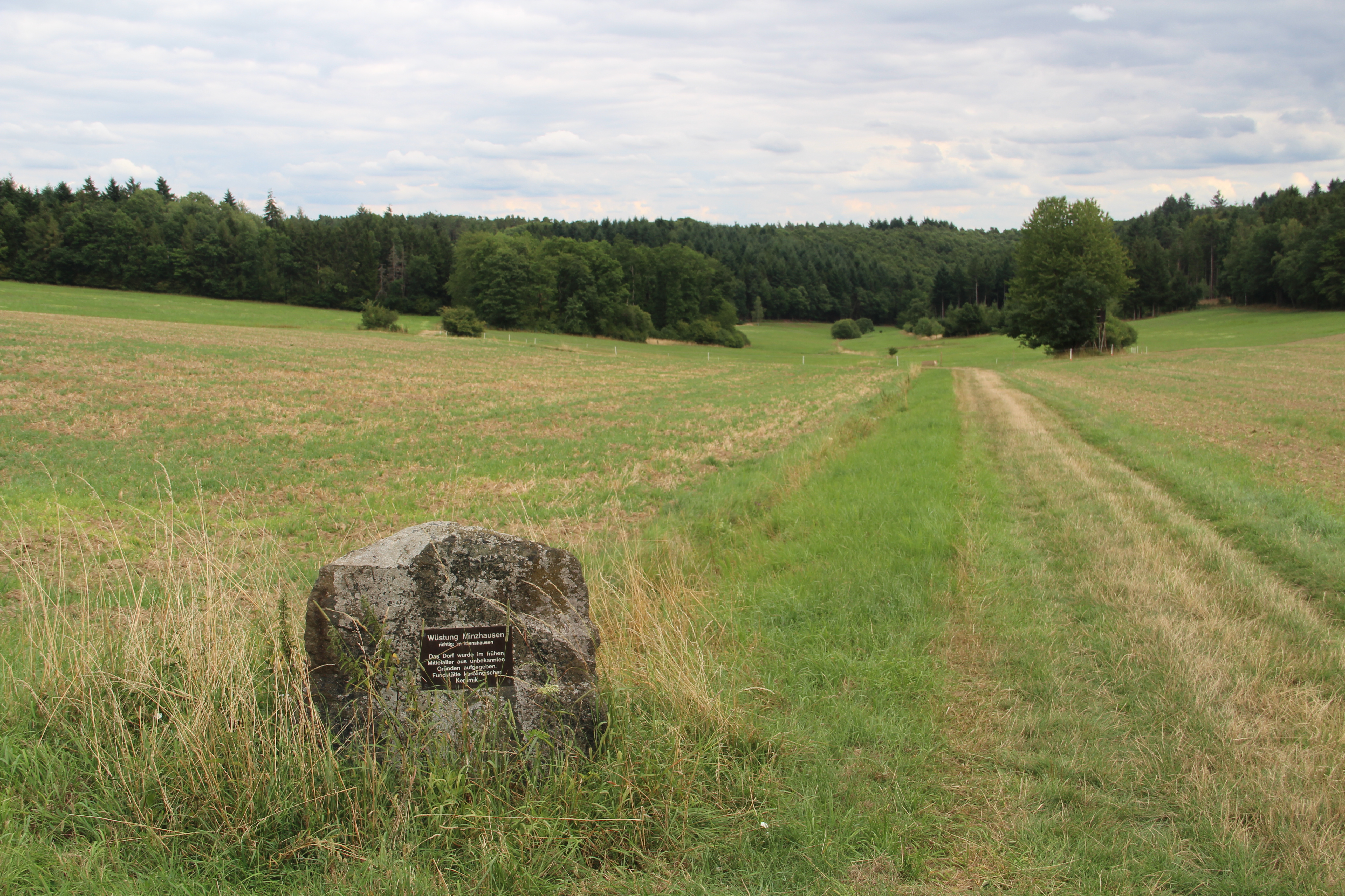 Wüstung Idenshausen bei Gladenbach nahe der Quelle des Kehnbach